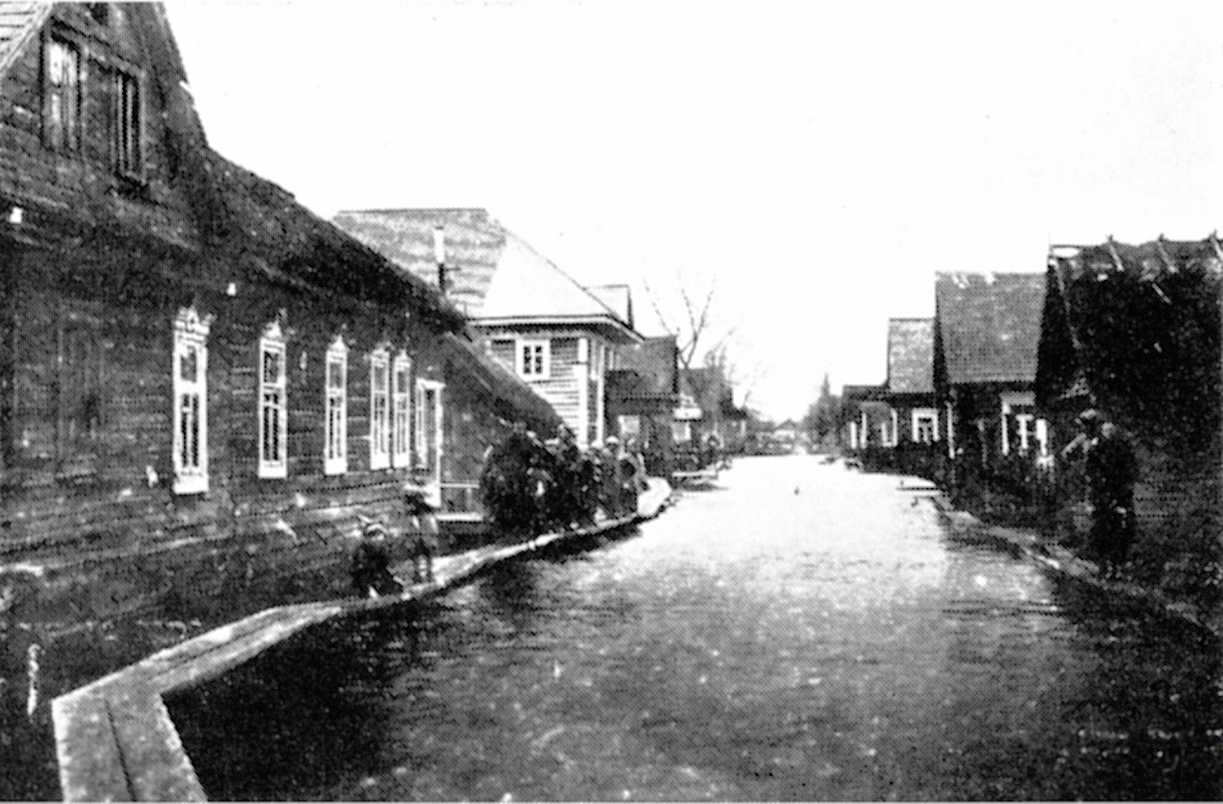 Беларуская (тарашкевіца): Ленін (Lenin), вуліца Падліп'я (vulica Padlipja)